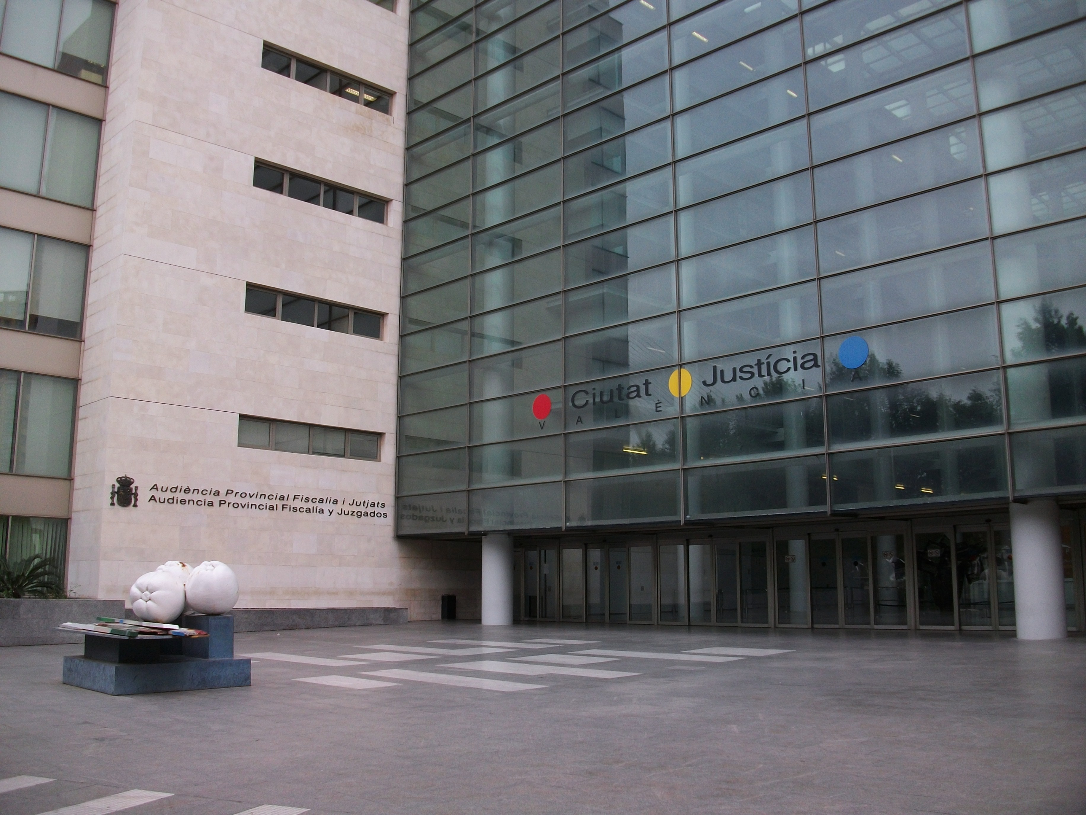 Ciutat de la Justícia de València.